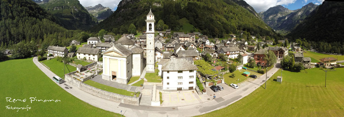 Vista aerea del paese